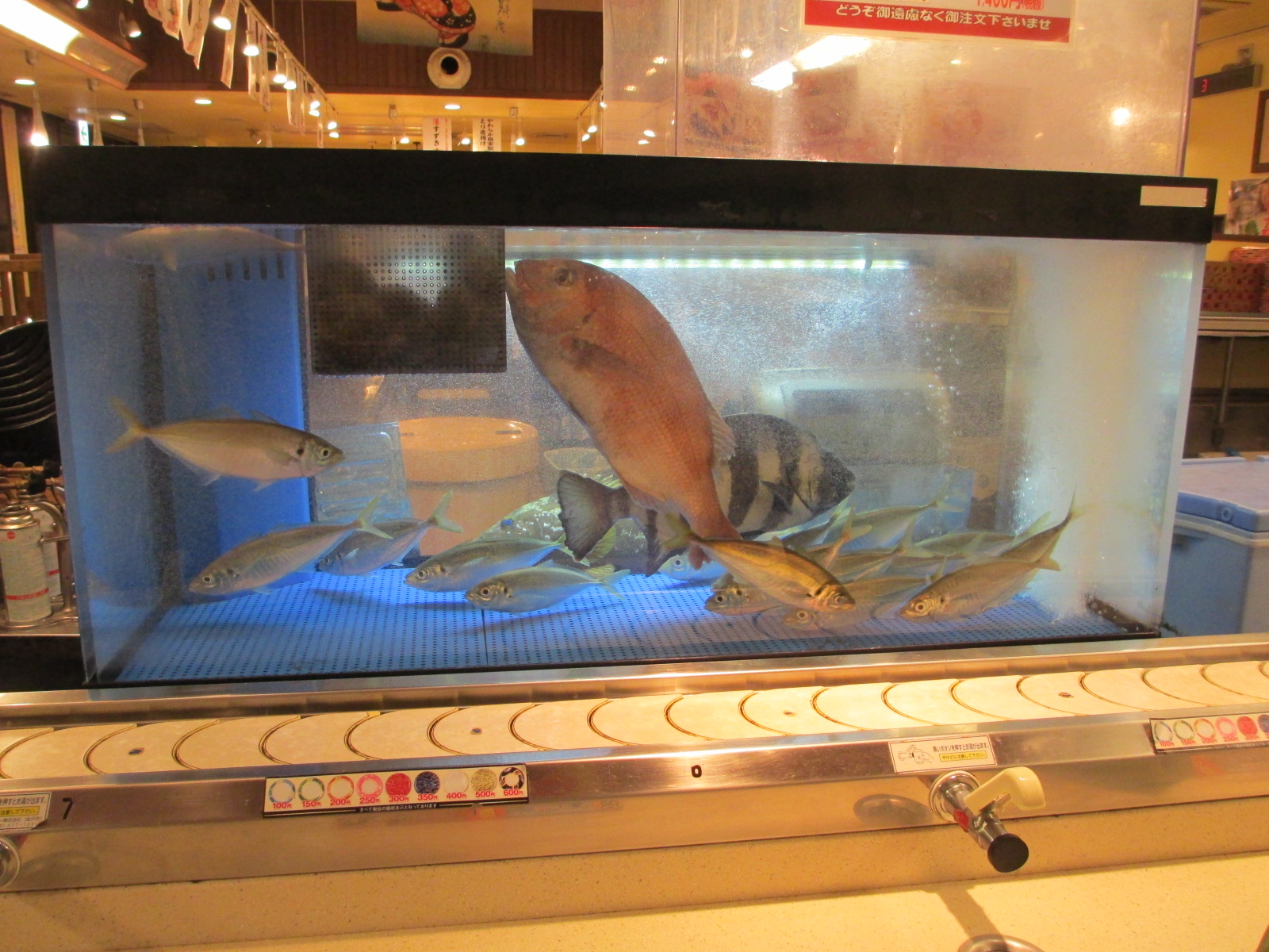 Kansaifoods Co., Ltd. 「力丸」店舗・いけす 真鯛、石鯛、鯵